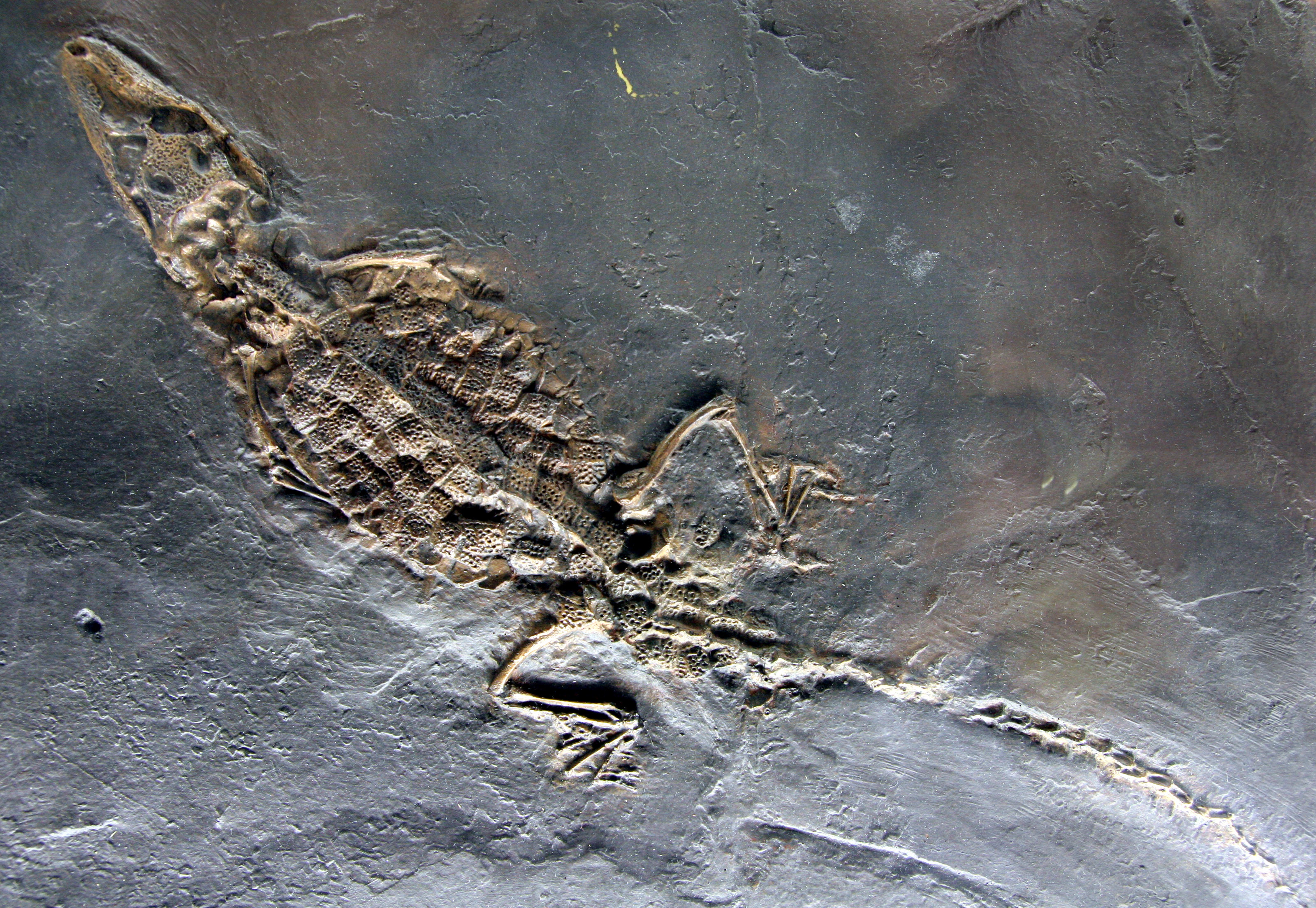 Doppelhundszahn-Krokodil (Diplocynodon darwini), Jungtier. Der hier fotografierte Abguss des Fossils befindet sich im Museum des Institutes für Geowissenschaften an der Ruprecht-Karls-Universität in Heidelberg (Im Neuenheimer Feld 234) [1]